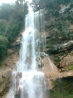 Air Terjun Tagor di Kampung Mambunibuni Distrik Kokas Kabupaten Fakfak, Papua Barat Indonesia